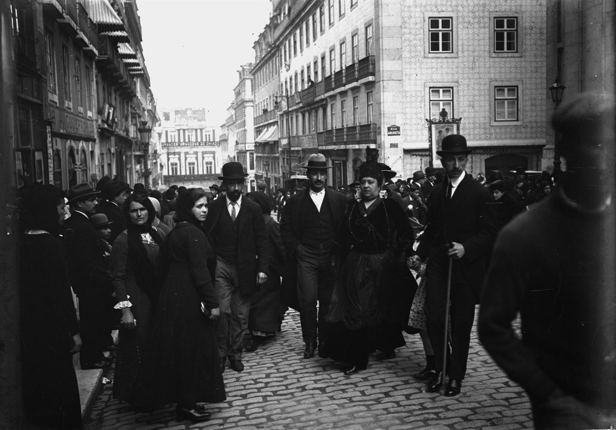 Título: [Visita às igrejas durante a Semana Santa] Dimensão: 9 x 12 cm Suporte: Negativo de gelatina e prata em vidro Notas: Inscrição no original: 7747. Artigo na Ilustração Portuguesa, 1912, 15 de Abril. Assunto: Páscoa / Tipos populares / Garrett (rua, Santa Maria Maior, Lisboa, Portugal) Código de referência: PT/AMLSB/JBN/001480